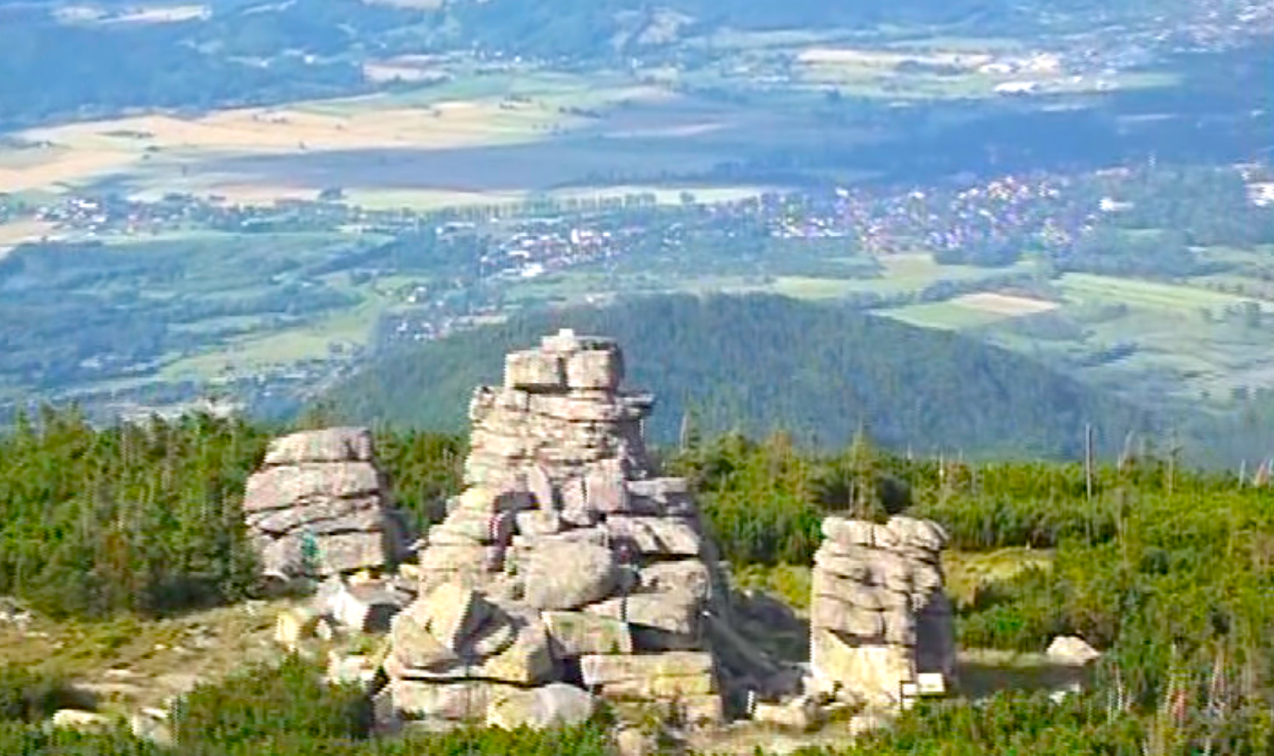 Czeskie kamienie - widok